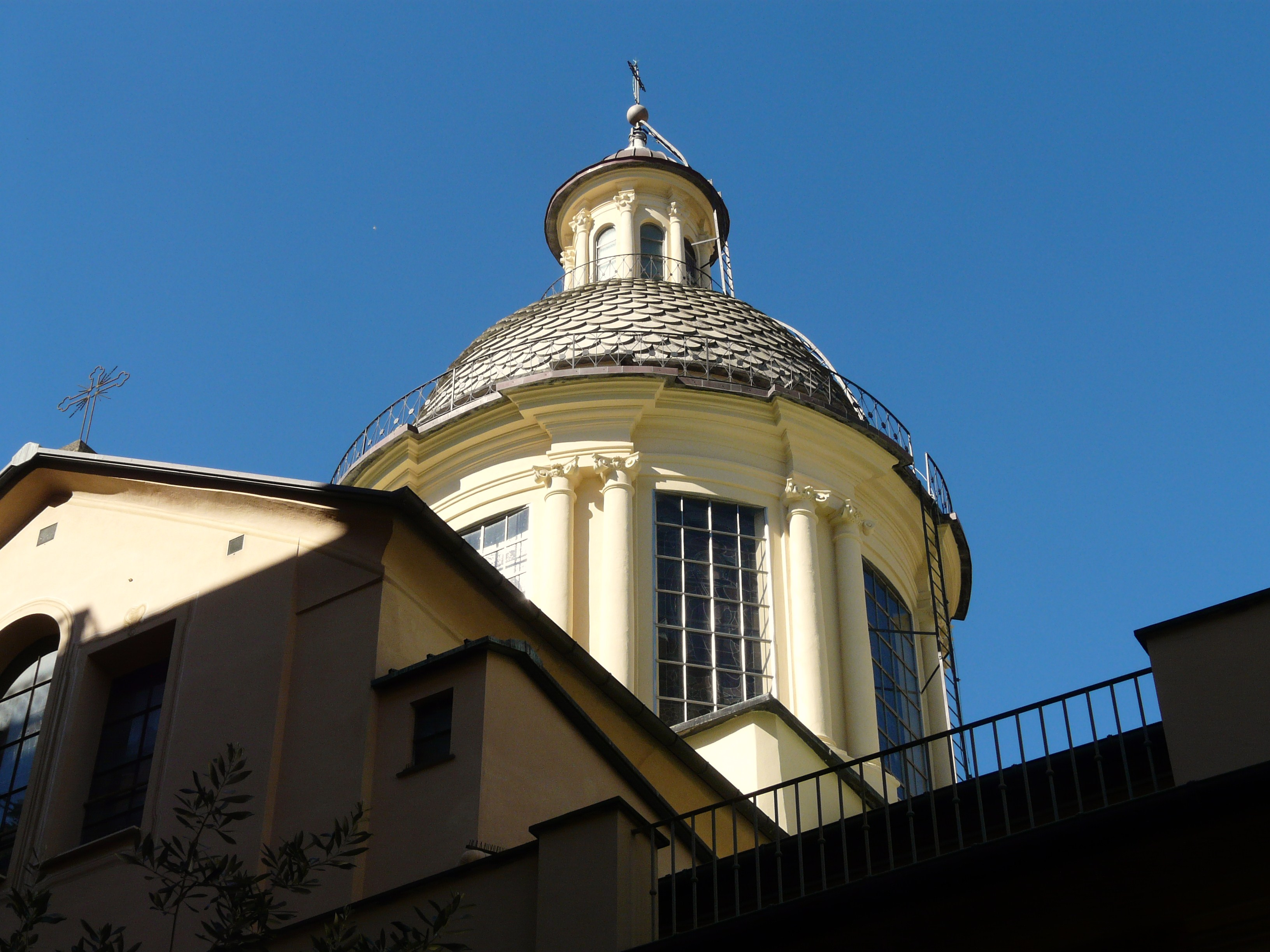 Cupola della basilica di Santa Margherita, Comune di Santa Margherita Ligure, Liguria, Italia